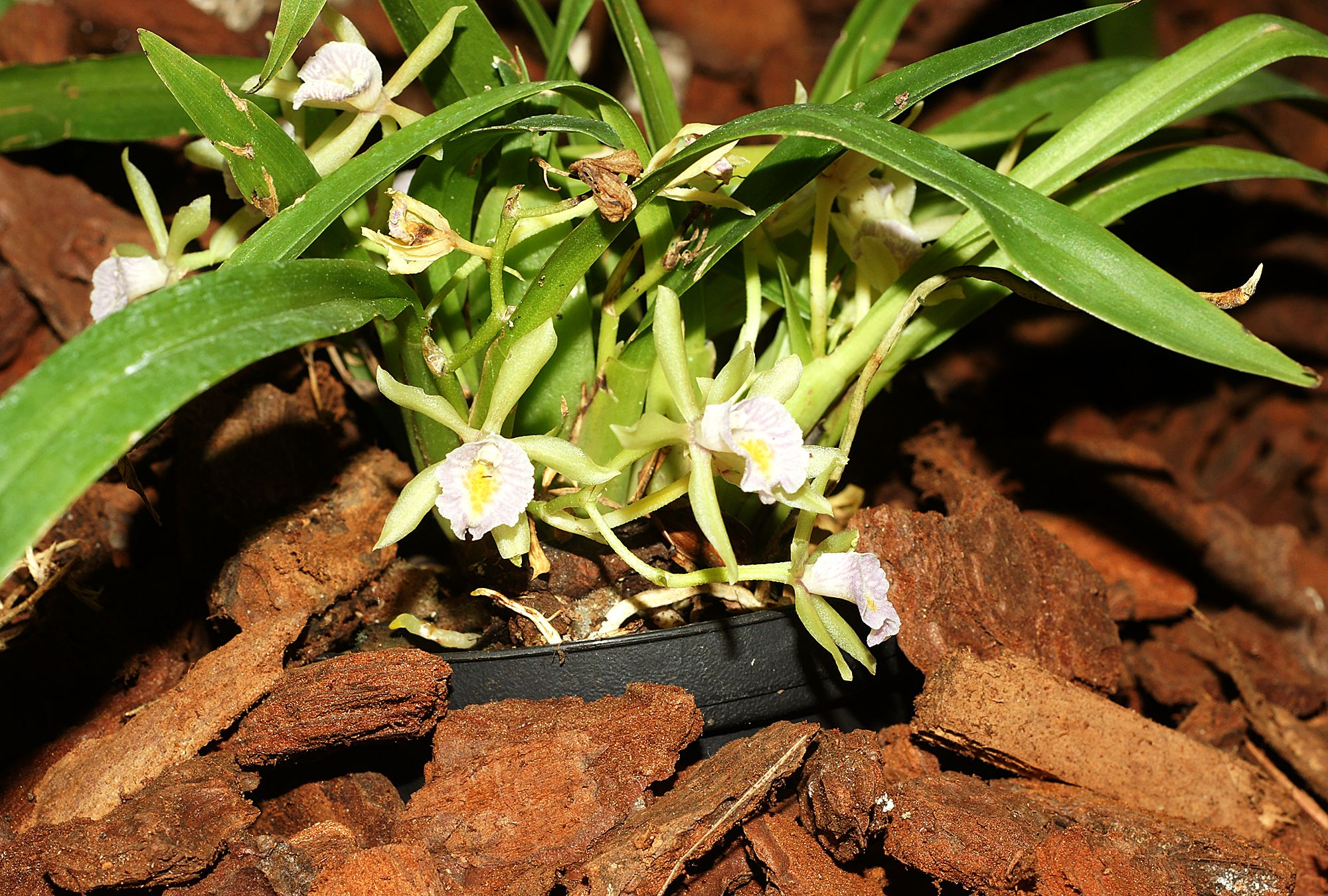 Cischweinfia dasyandra